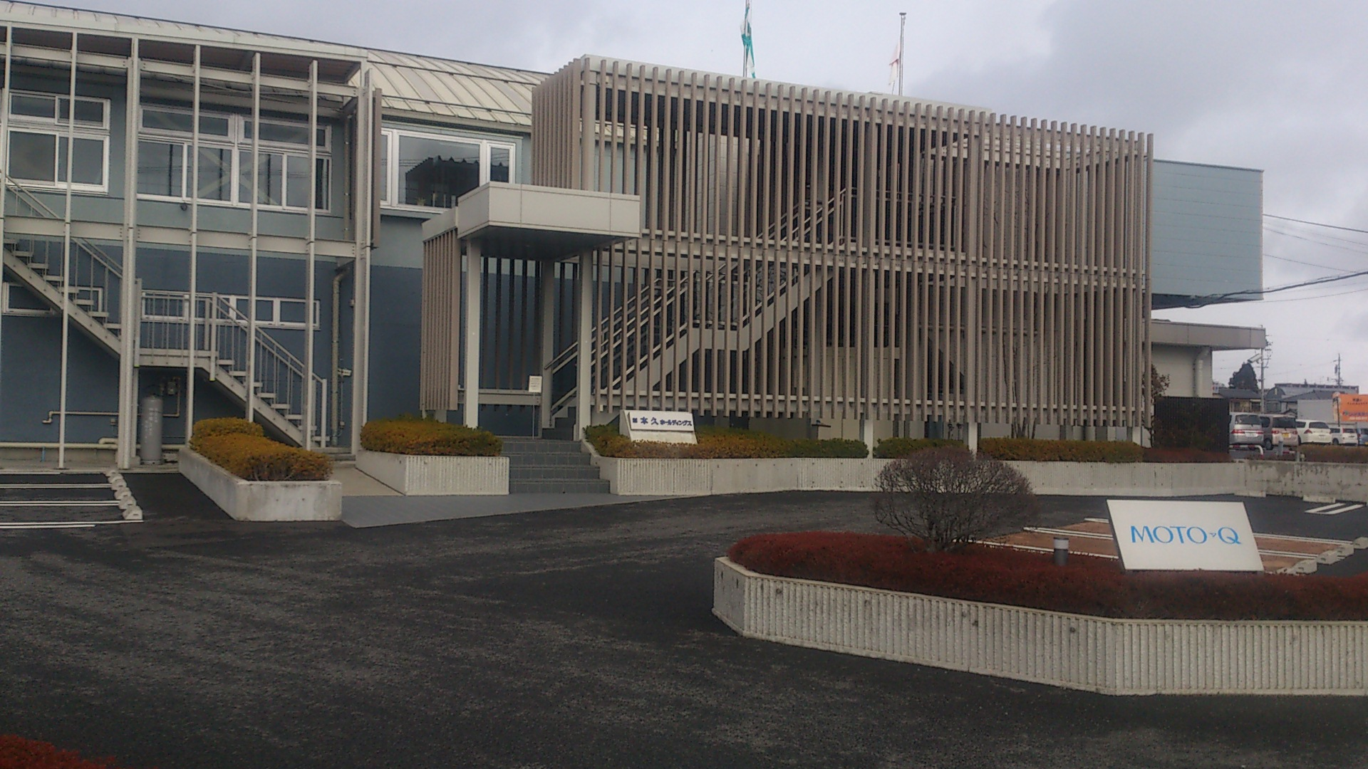 本久本社（長野県長野市桐原一丁目）